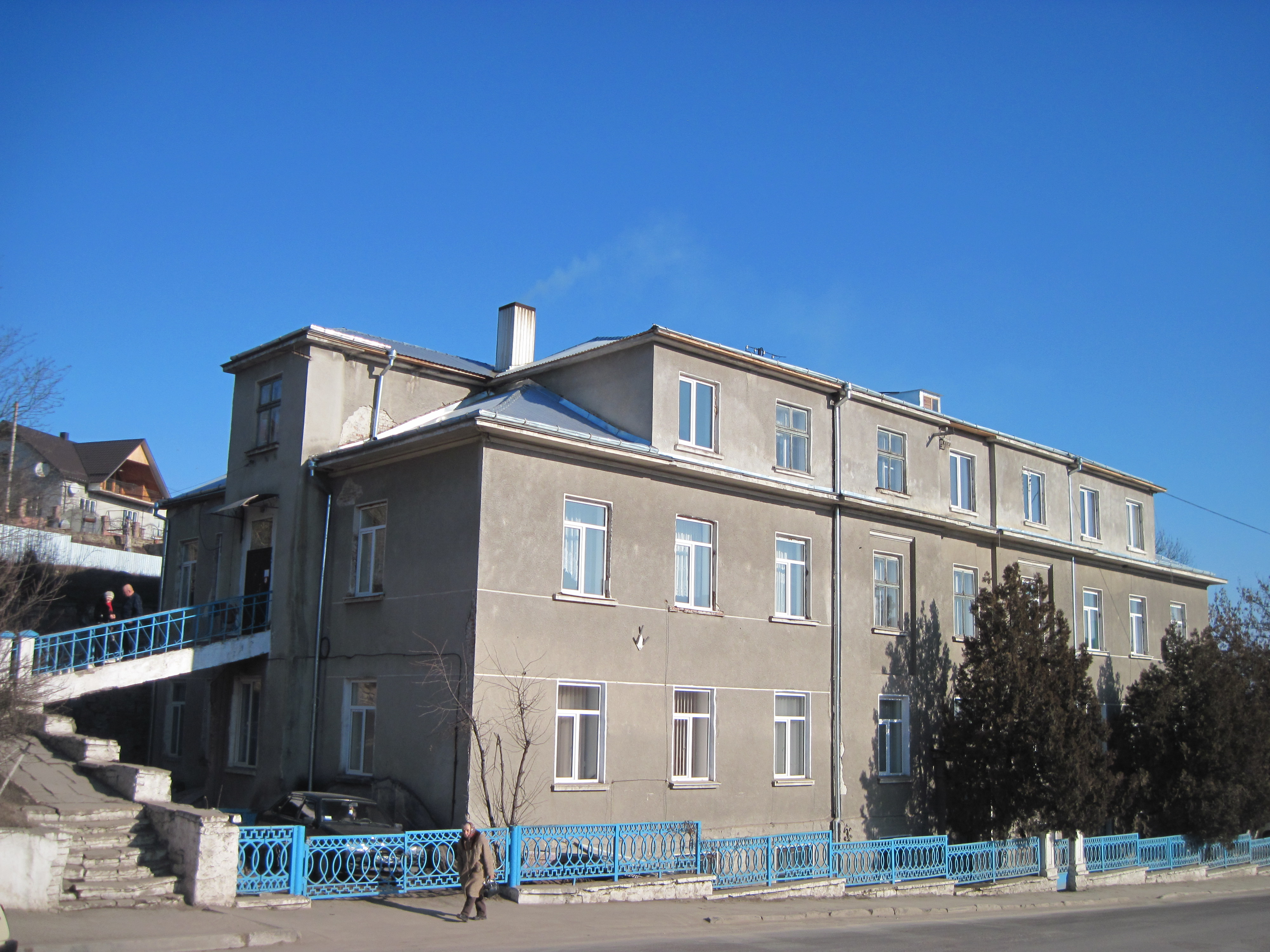 Колишнє приміщення Каси хворих, Бучацького радгоспу-технікуму, тепер корпус Бучацької центральної районної клінічної лікарні, лютий 2015